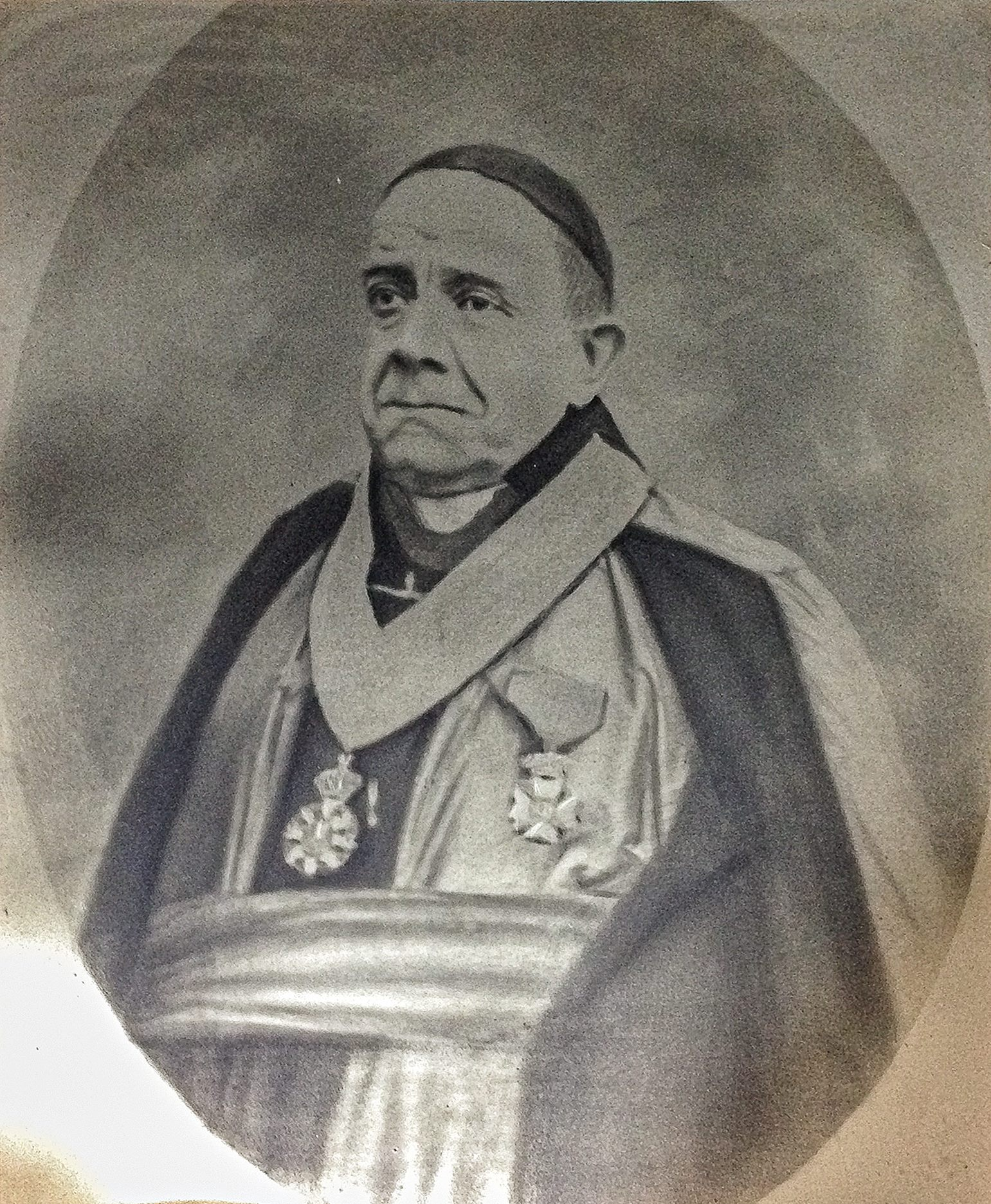 Ritratto di Giustino Quadrari